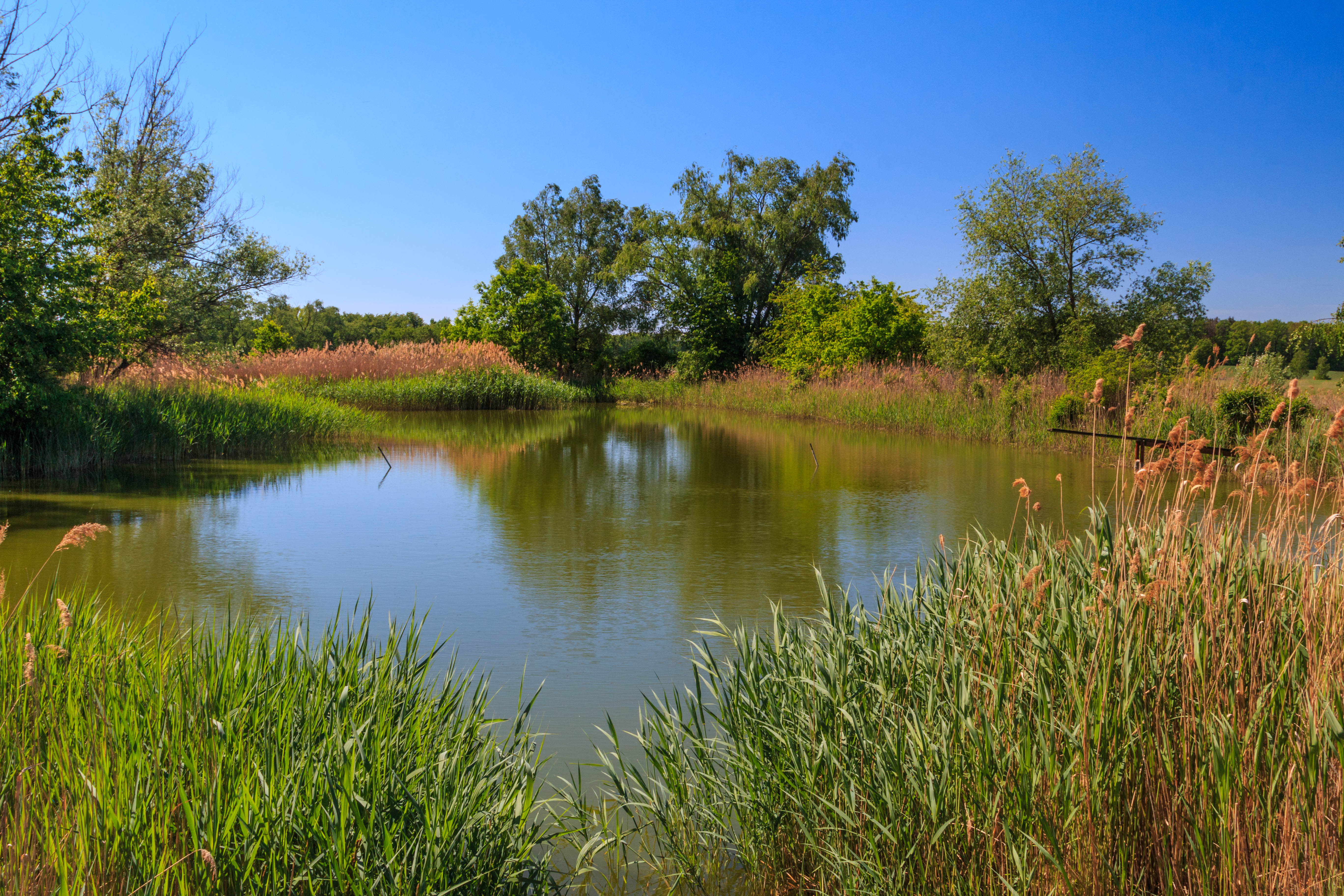 Rybníček Pod Borkem Project: Vodstvo.